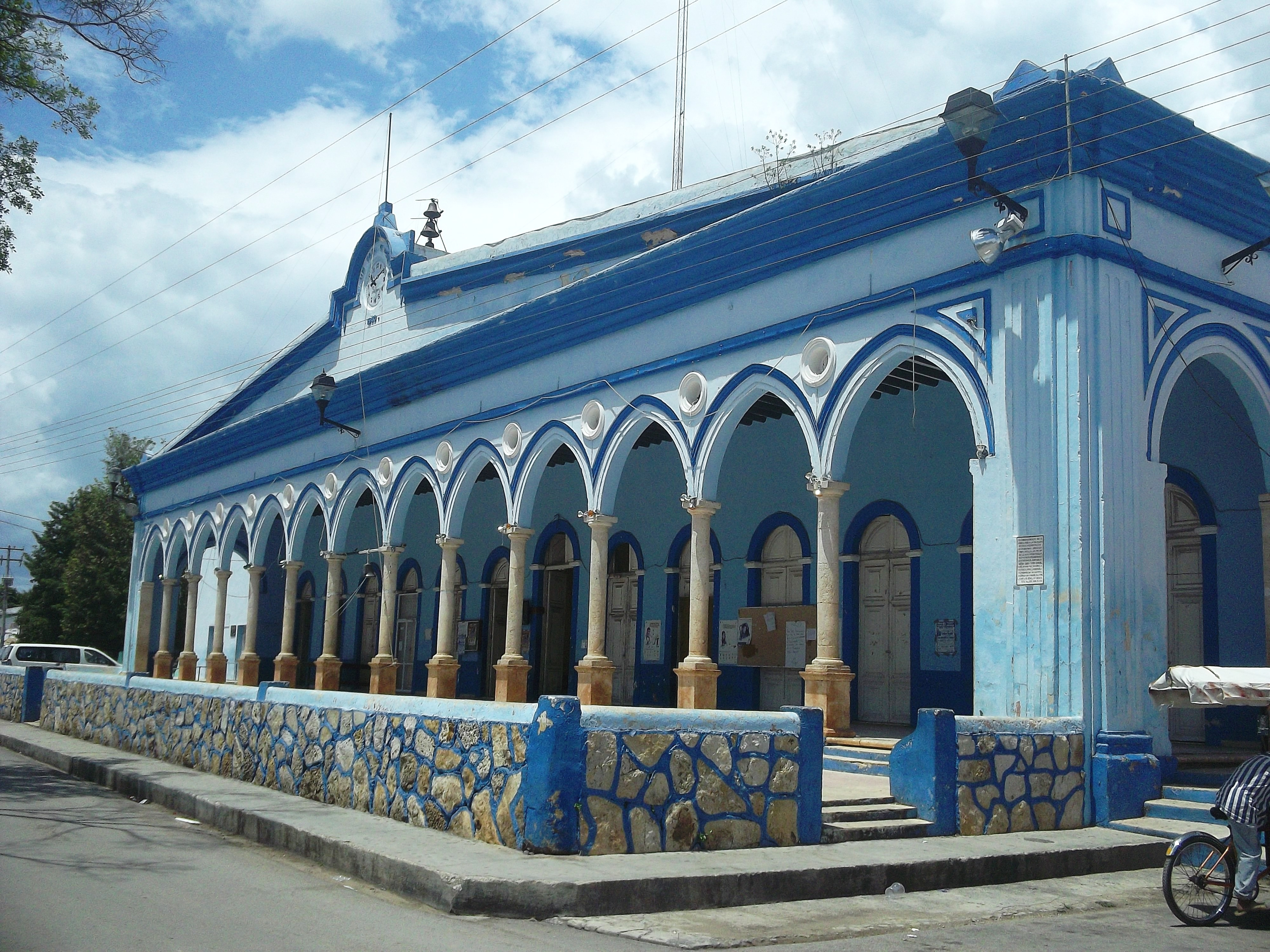 Palacio municpal de Seyé, Yucatán.